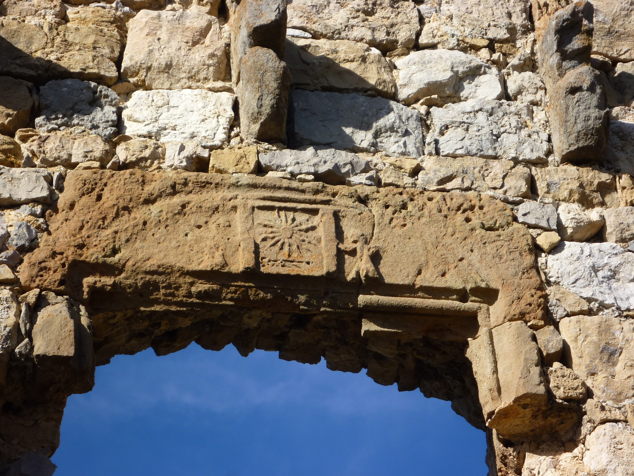 Castell d'Odèn: dintell d'una finestra